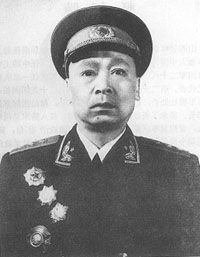 周纯全授勋图